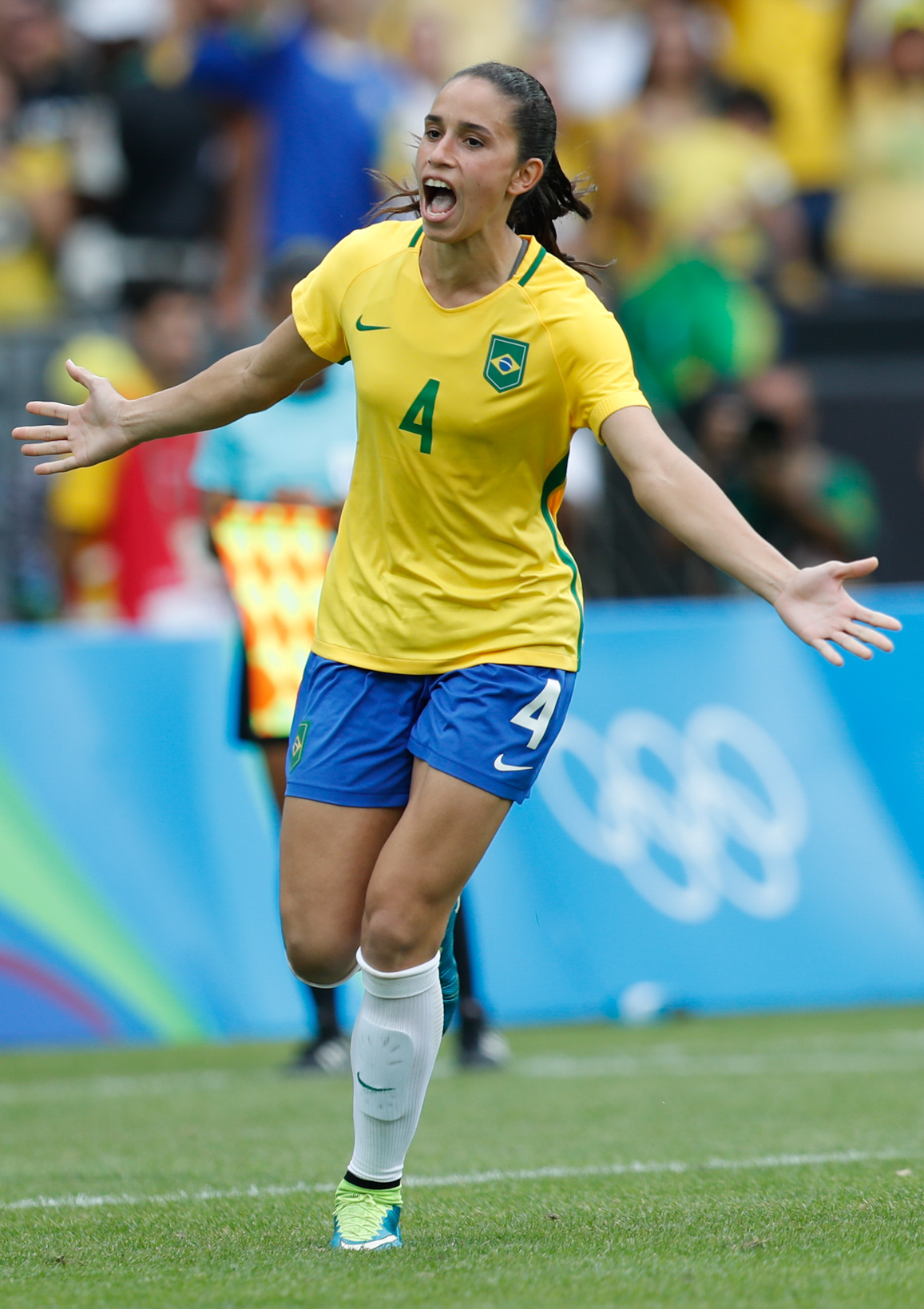 Rio de Janeiro - Seleção brasileira de futebol feminino disputa semifinal com a Suécia, no Maracanã. O Brasil perde nos pênaltis e vai disputar o bronze (Fernando Frazão/Agência Brasil)